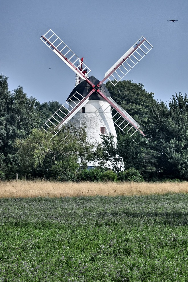 Pedersker Kirkemølle on the island of Bornholm, Denmark